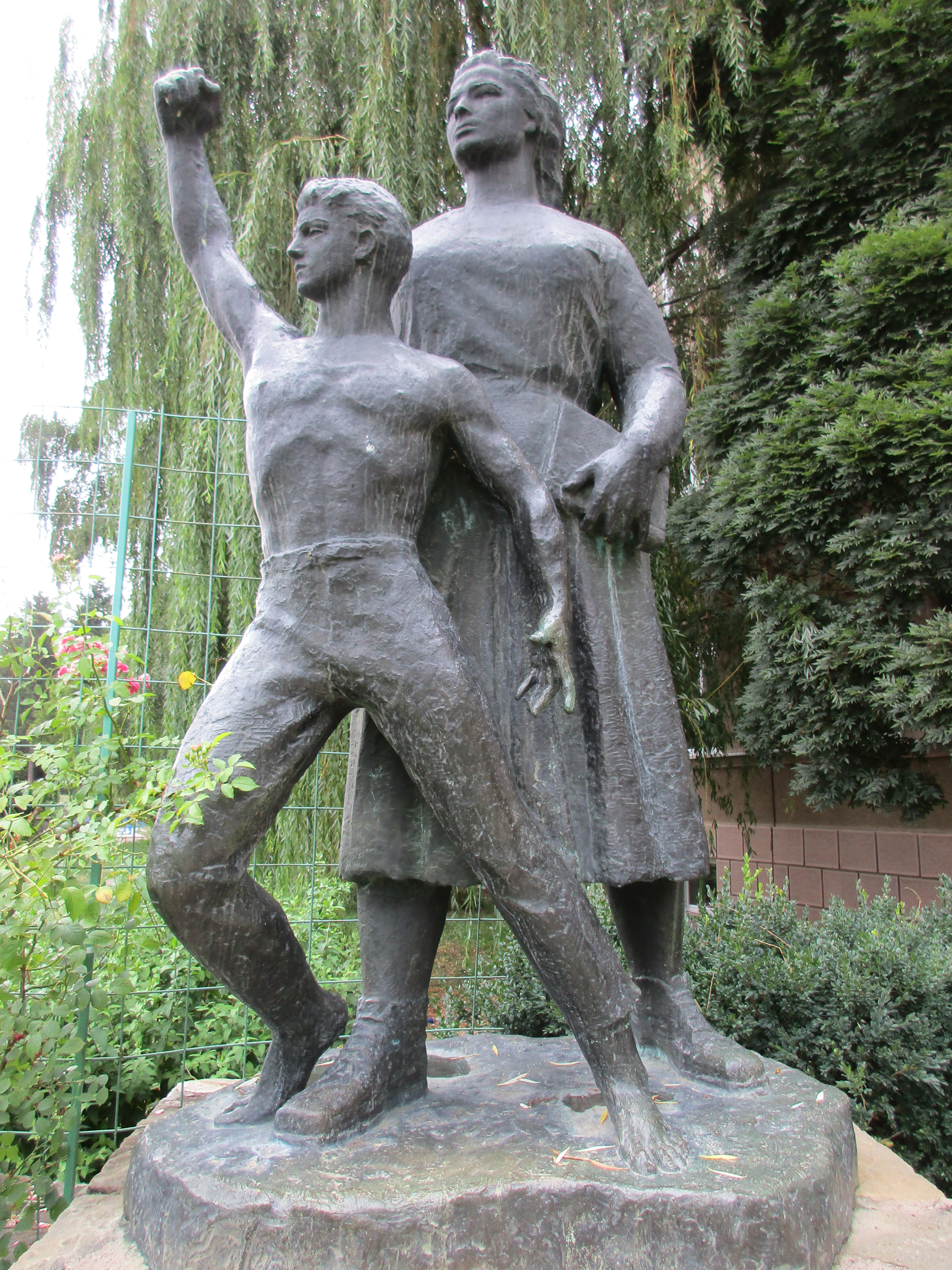 Srpski (latinica): Osnovna škola Drinka Pavlović, Kuršumlija